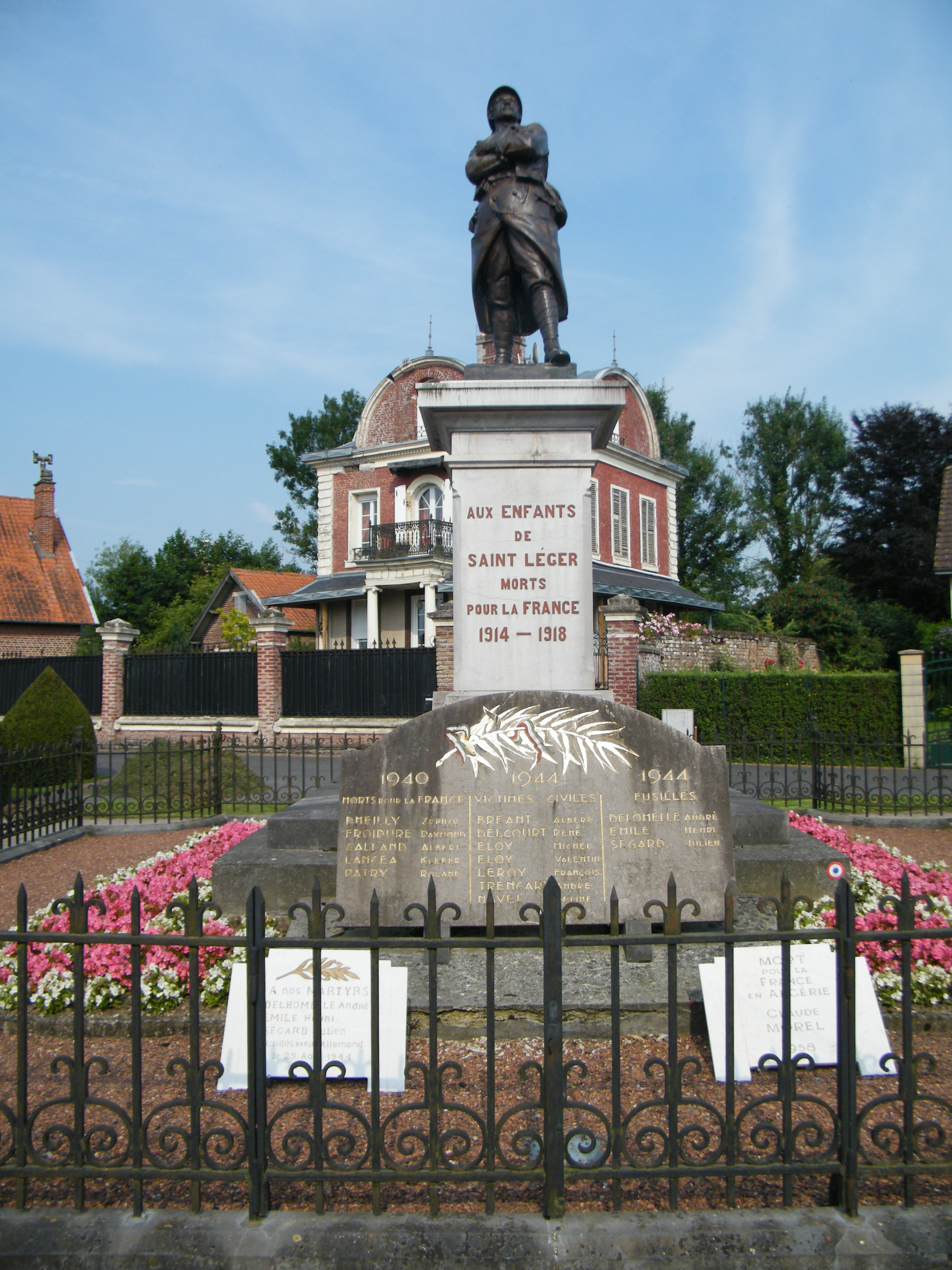 Monument aux morts pour la patrie.